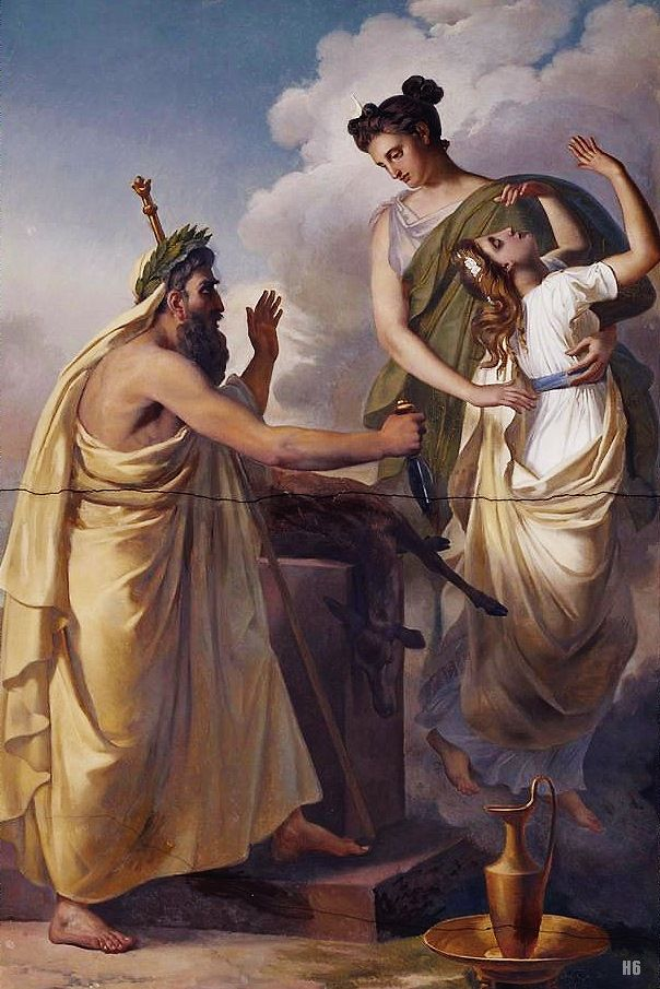 Le Sacrifice d'Iphigénie